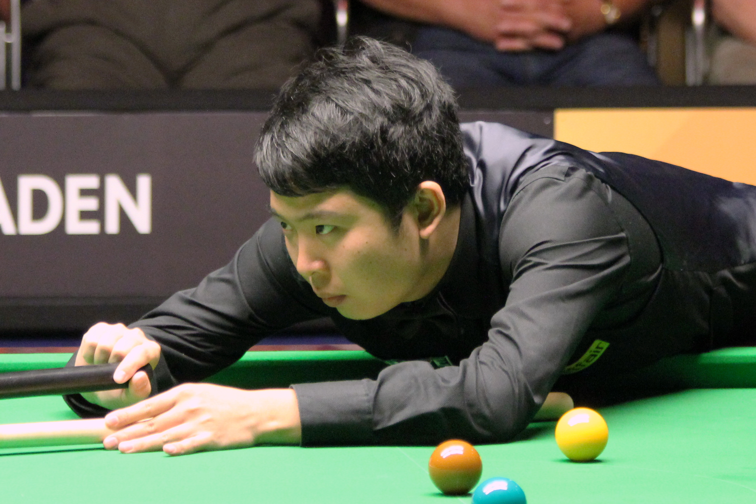 Zhang Anda beim Paul Hunter Classic 2012